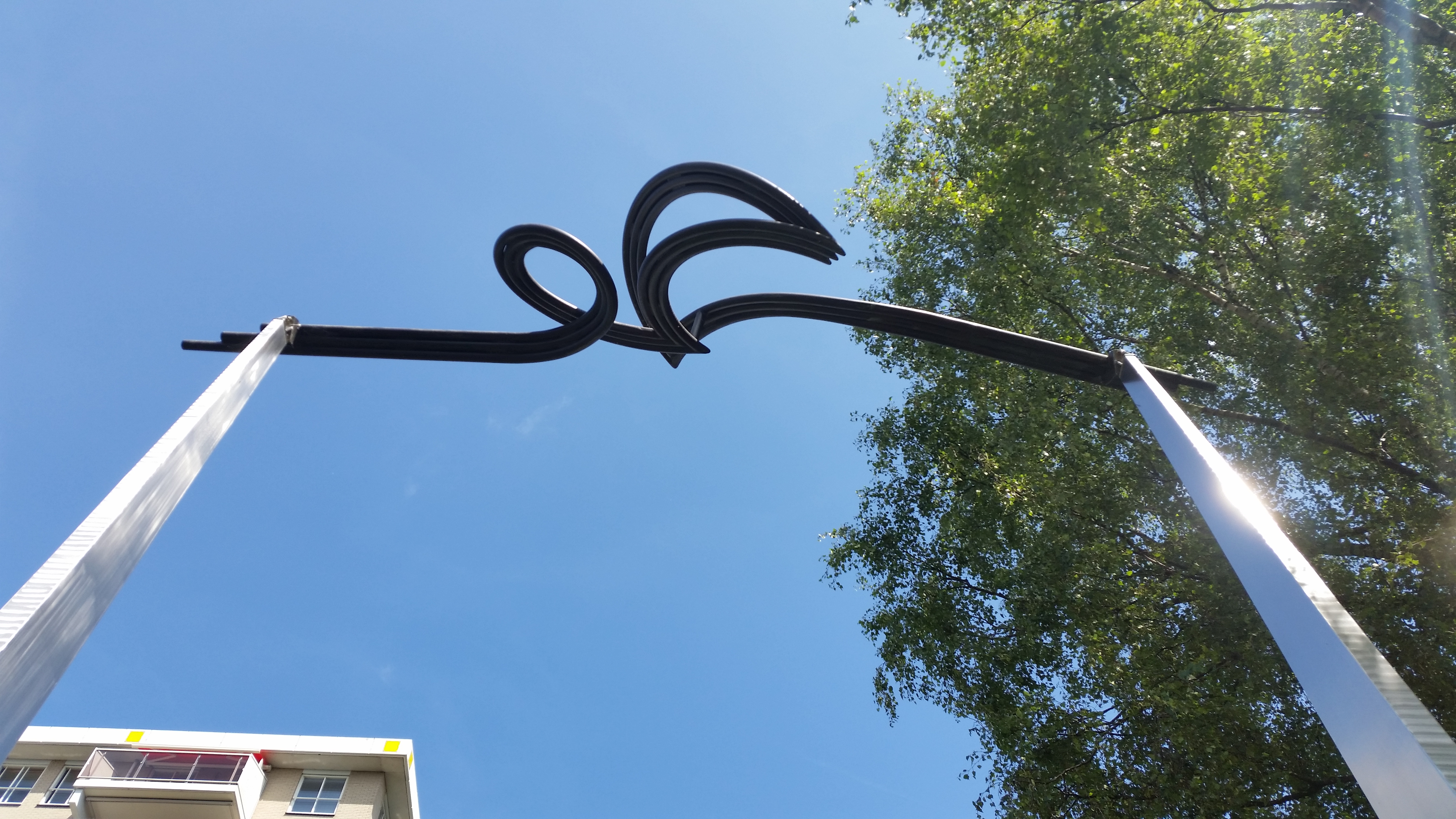 Een van de twee kunstwerken op Brug 1801 (in Amsterdam)